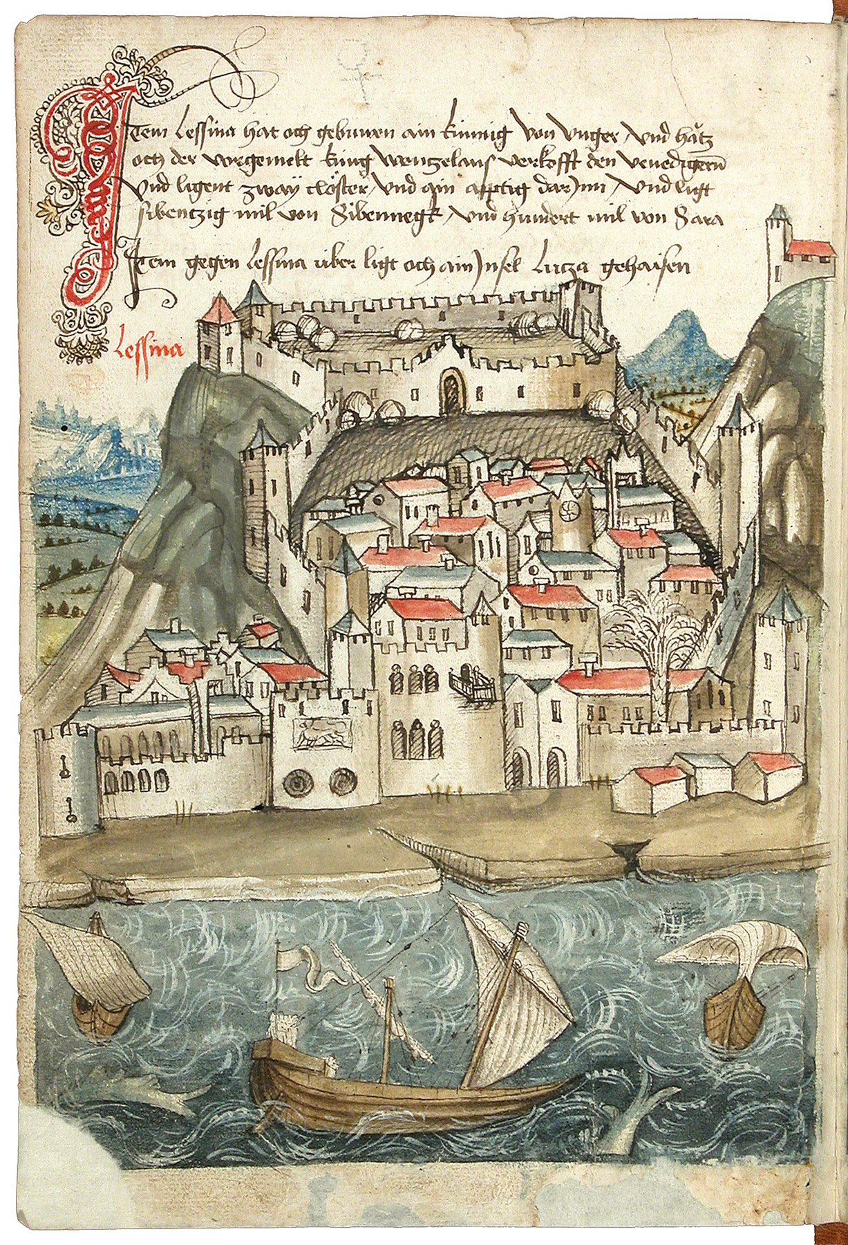 Schilderung einer Pilgerreise von Konstanz nach Jerusalem durch Konrad von Grünenberg, um 1487 Konrad von Grünenberg: Beschreibung der Reise von Konstanz nach Jerusalem - Cod. St. Peter, pap. 32. Handschrift, Bodenseegebiet (Konstanz?), um 1487. II + 53 Blätter, 32x21, mit 31 kolorierten Zeichnungen der Reiseroute von Venedig bis Palästina. Text in alemannischer Mundart.